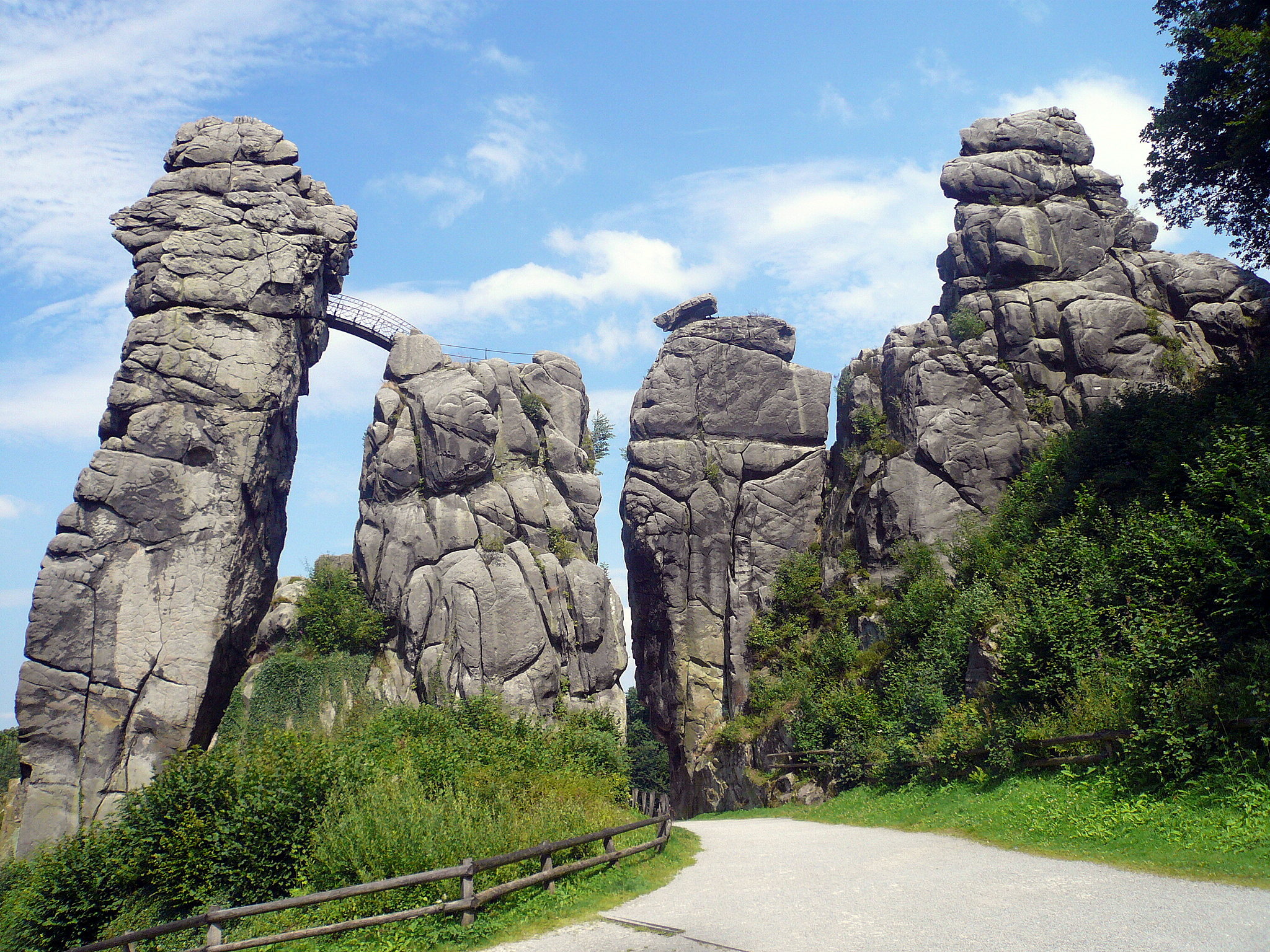 Teilansicht der Externsteine, einer markanten Sandstein-Felsformation im Teutoburger Wald. Sie befinden sich bei Horn-Bad Meinberg im Kreis Lippe und sind eine herausragende Natursehenswürdigkeit in Deutschland.